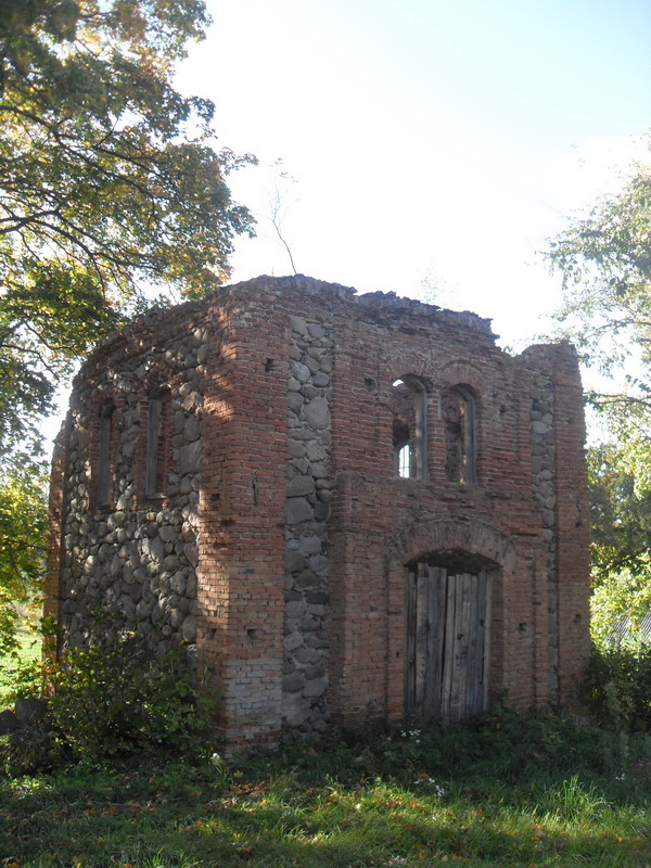 Сурвілішкі. Званіца на могілках